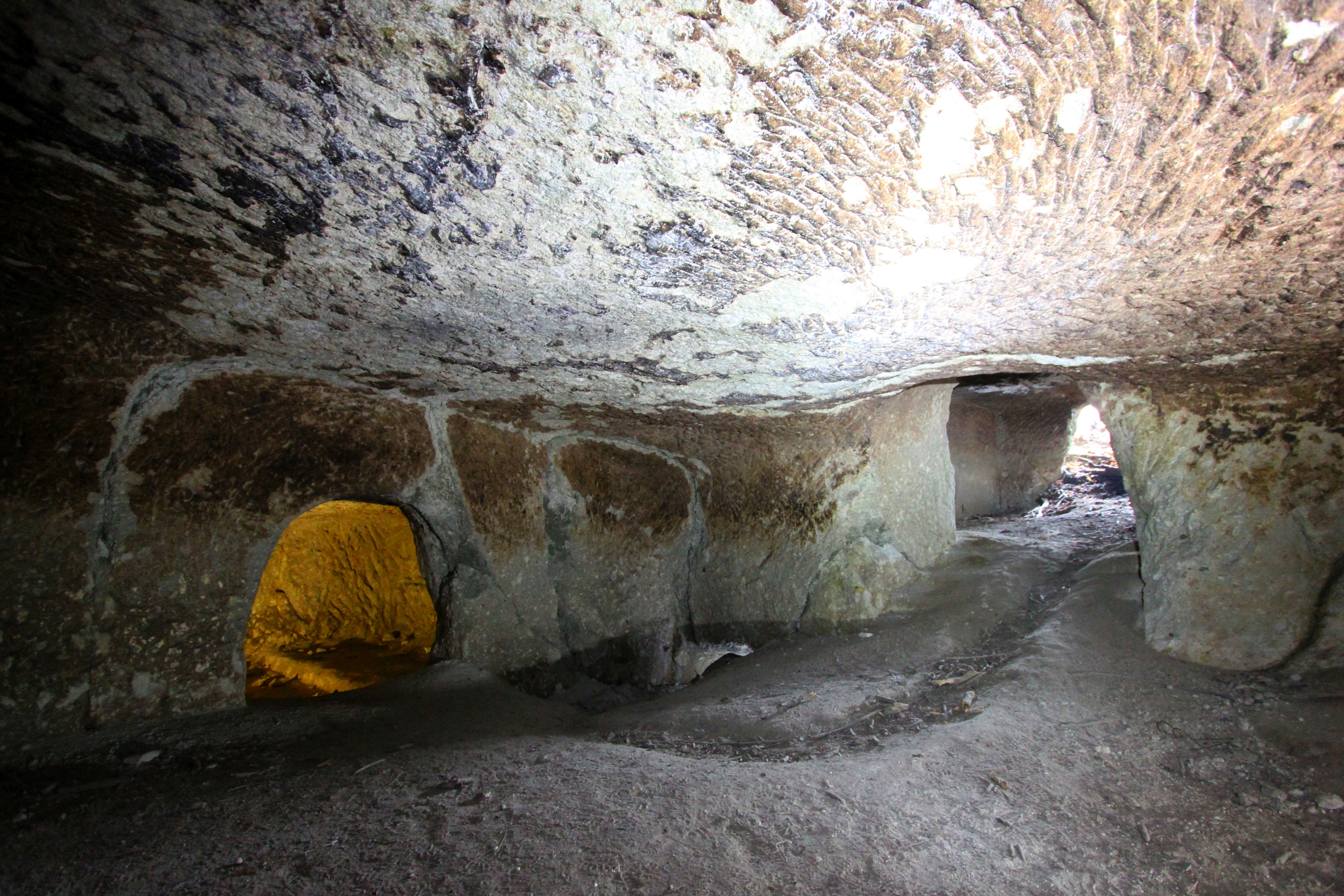 A Százrejtekű Andornaktálya határában